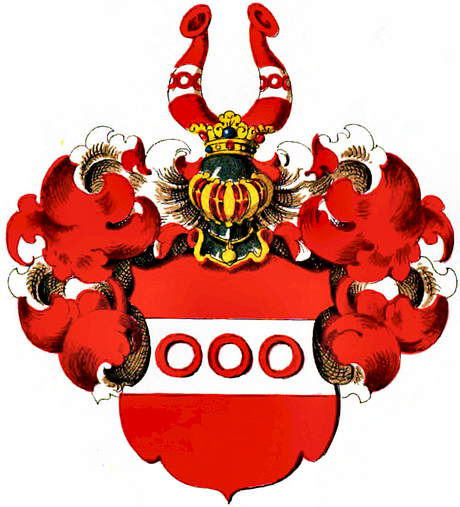 Wappen der Freiherren Reichlin von Medegg